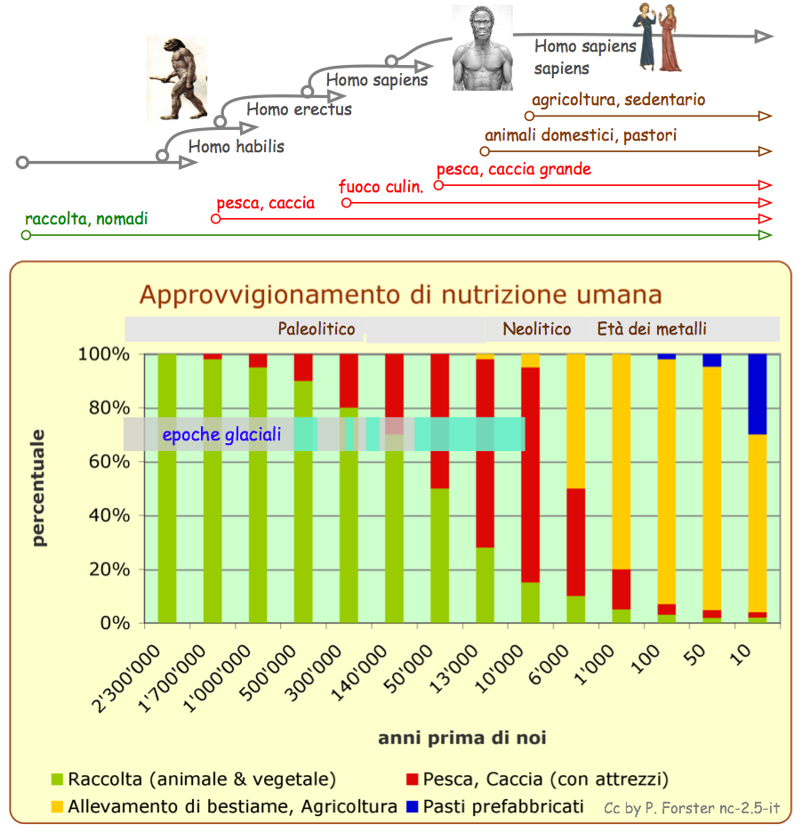 Grafica: Medicina: Dietetica: Approvvigionamento di alimenti umani dal paleolitico: nutrizione, alimentazione, raccolta, pesca, caccia, fuoco culinario, allevamento di bestiame, agricoltura, pasti prefabbricati, paleolitico, neolitico, età dei metalli